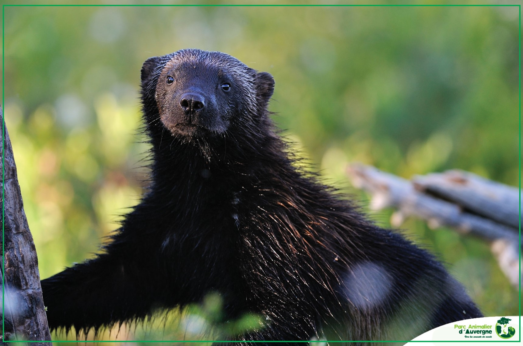 Glouton